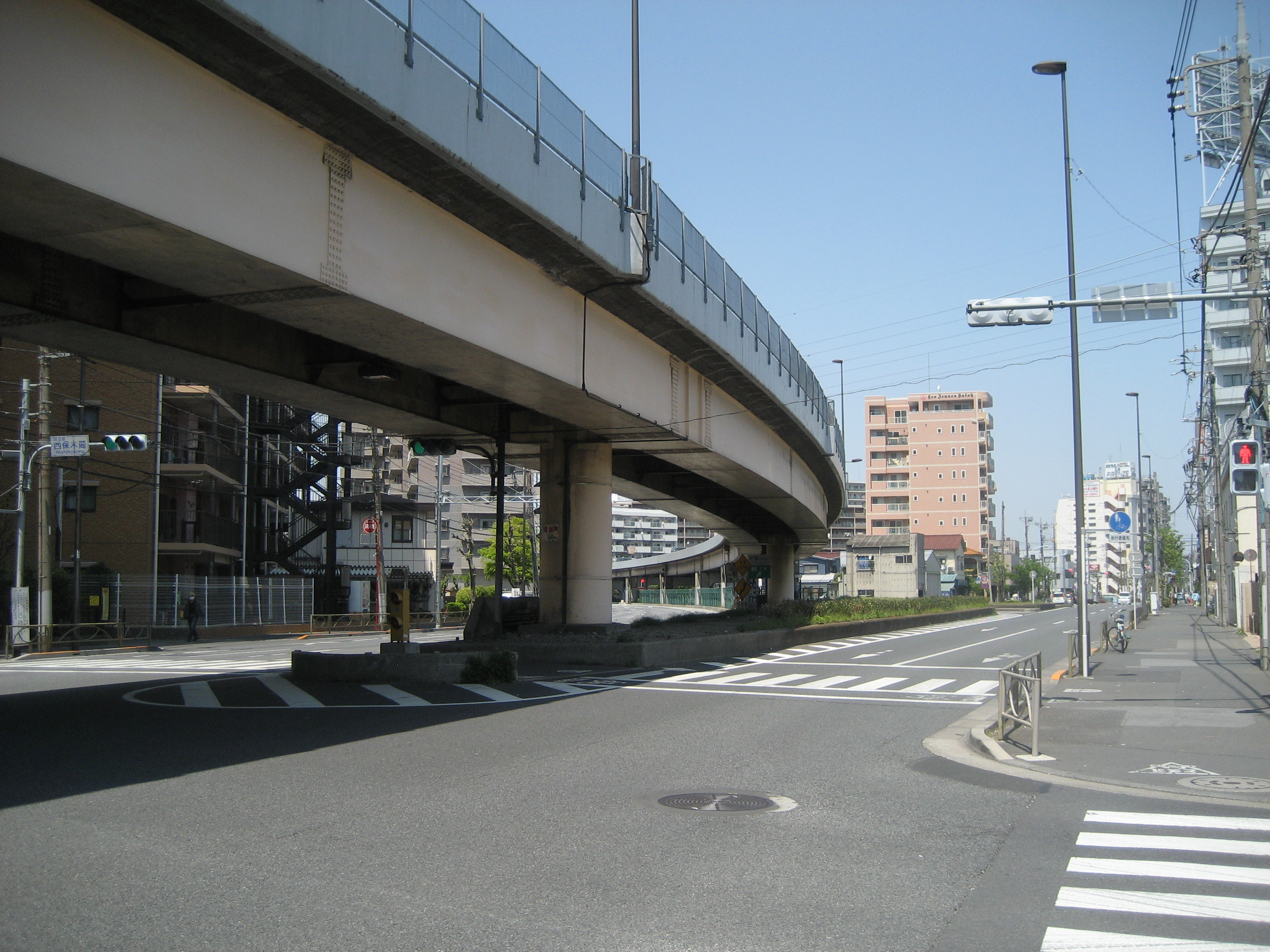 国道4号線東京都足立区西保木間交差点（都道49号（旧国道4号線）との分岐・合流付近）